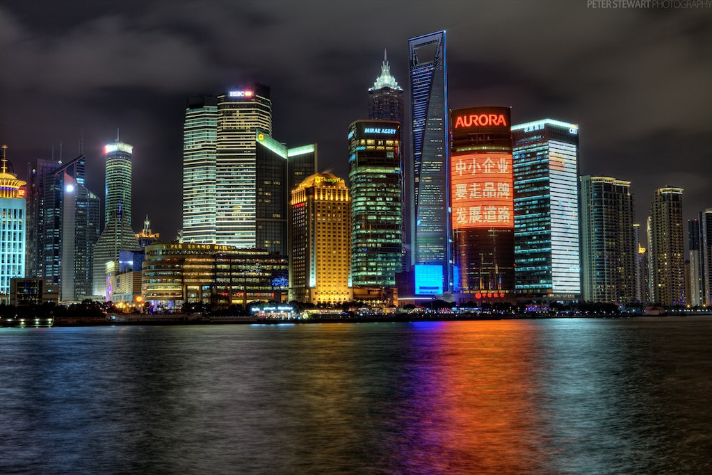 Shanghai Skyline HDR